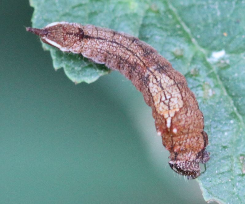 Raupe des Weißen Sichelflüglers (Cilix glaucata) am 10.9.2016 am Rheinufer südlich von Mannheim